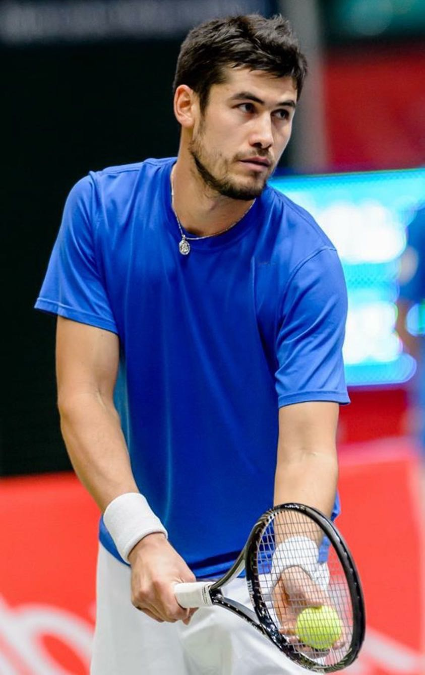 Farrukh Dustov - Atp Challenger 2105